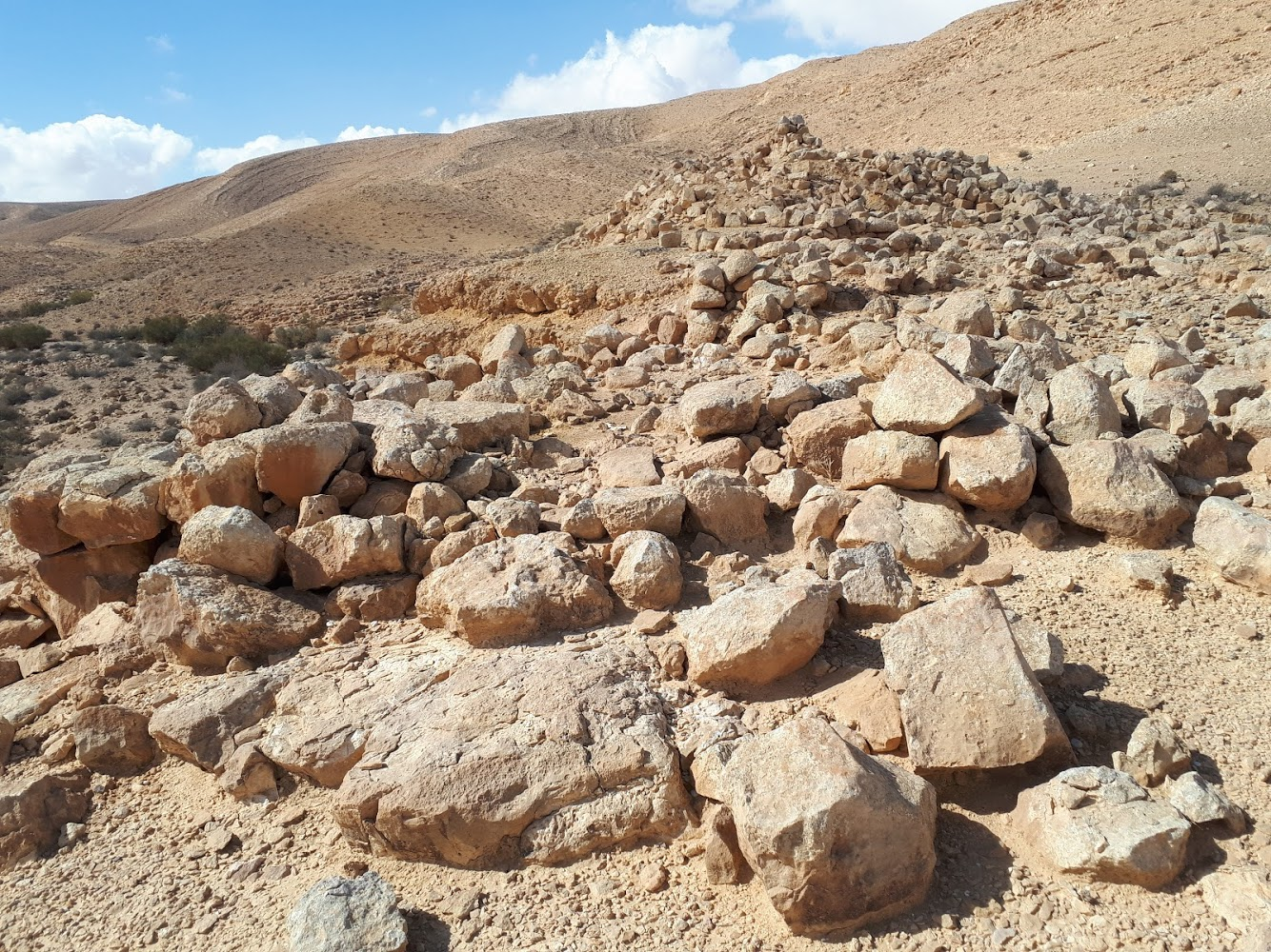 מצד גרפון הנבטי